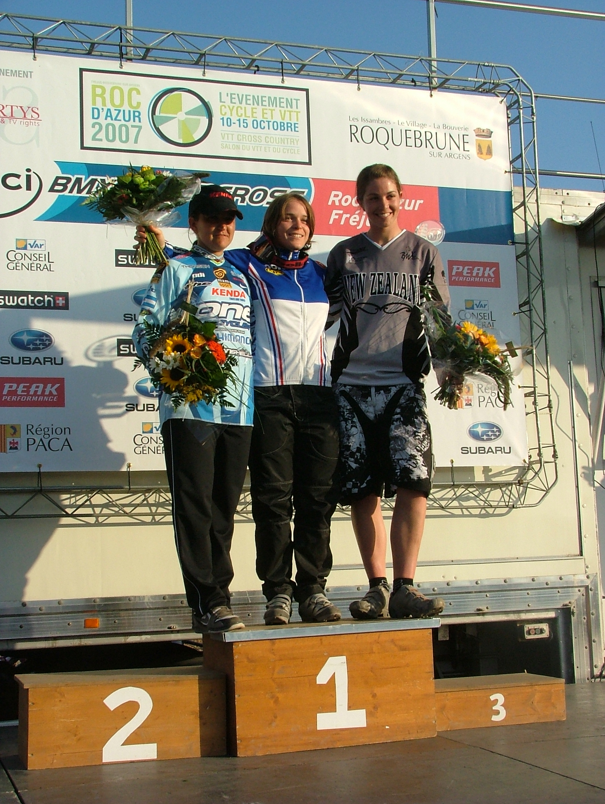 Premiazione classifica generale femminile: 1 Laëtitia Le Corguillé (FRA) 2 Gabriela Diaz (ARG) 3 Sarah Walker (NZL)